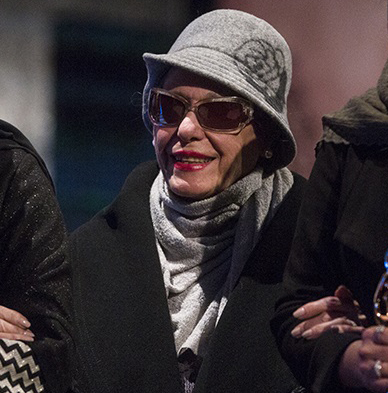 پری زنگنه - پنجمین جشن سالانه موسیقی ما - ۱۵ دی ۱۳۹۷ مرکز همایش های برج میلاد تهران